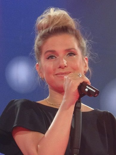 Jeanette Biedermann bei Die Besten im Sommer